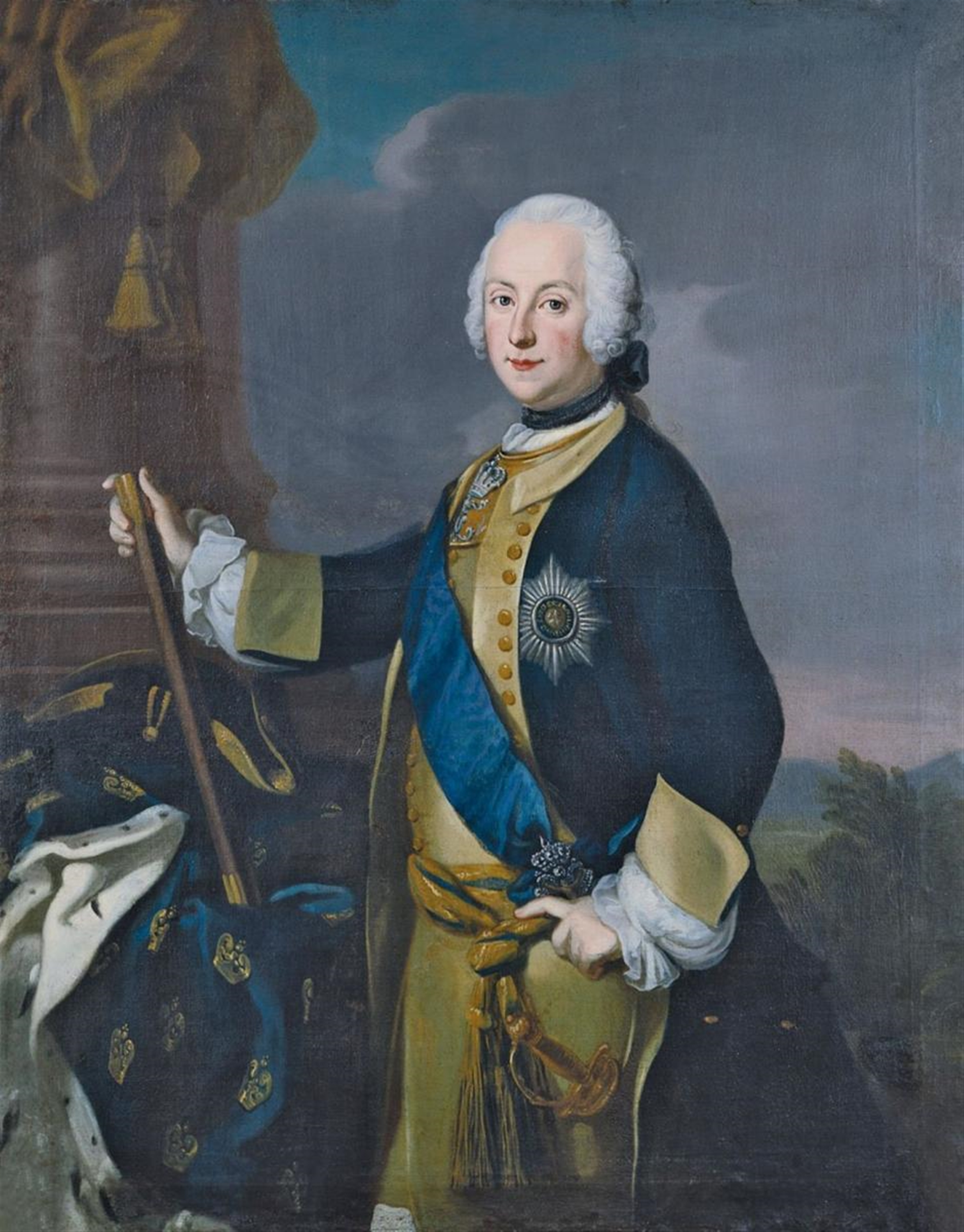 Bildnis des Adolf Friedrich von Schleswig-Holstein-Gottorp, ab 1751 König von Schweden